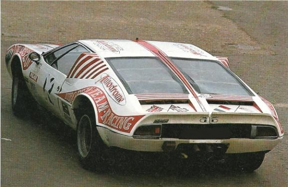 De Tomaso Mangusta in Rom JPEG-Bild, Abmessungen;579 x 377, 61kb Lizenz: Ich stimme der Public-Domain Lizenz zu und veröffentliche das Foto.